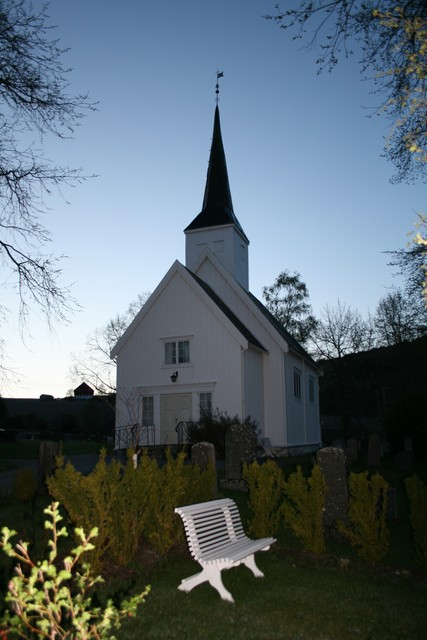 Salberg kyrkje en: Salberg church